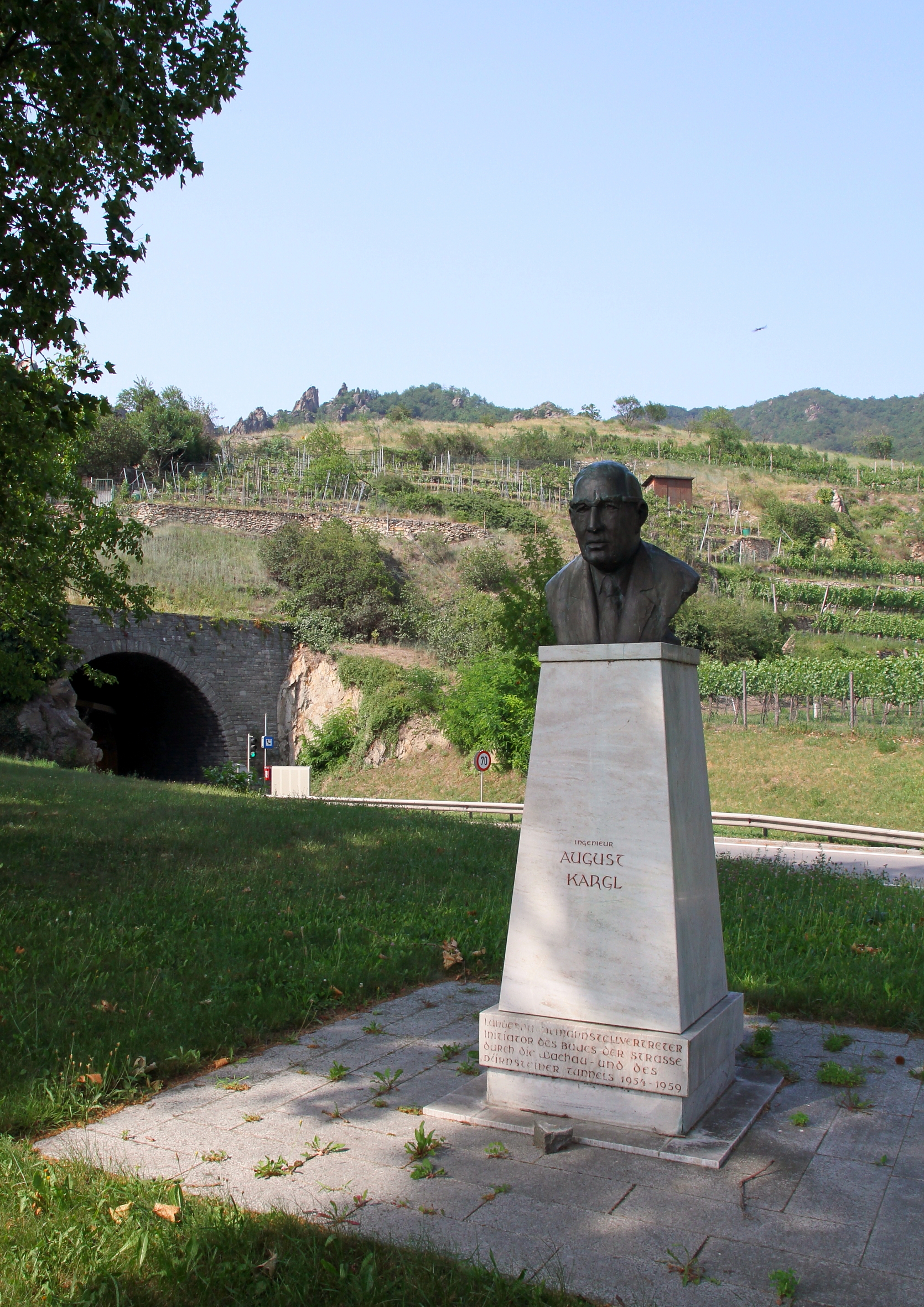 Persönlichkeitsdenkmal bezüglich dem Politiker und Ingenieur August Kargl in Dürnstein.